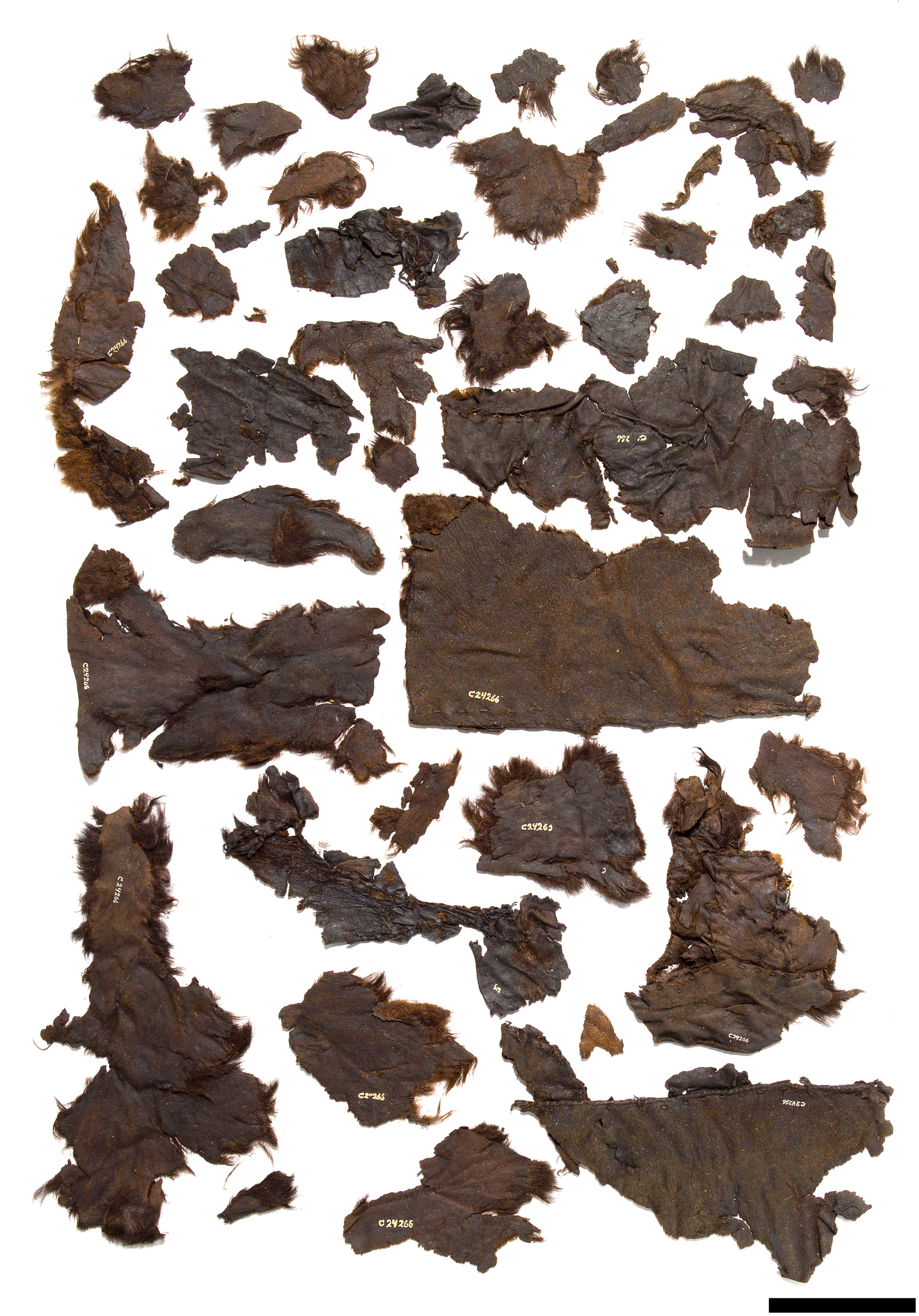 Skindslag fra Horreby Lyng, som formodentlig har tilhørt det ofrede barn, hvis kranium nu er kommet til Nationalmuseet.